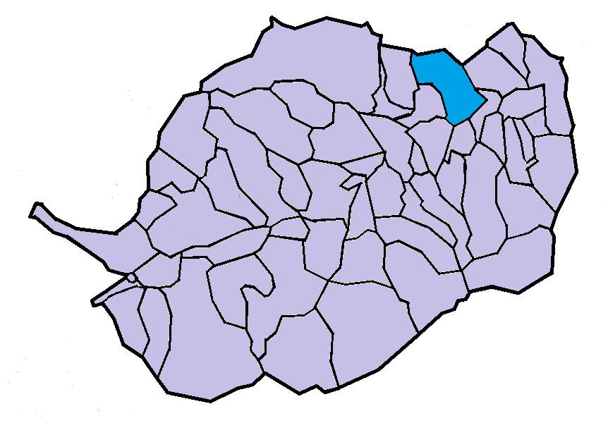 Eus en el Conflent, a partir del mapa municipal del Conflent de lliure disposició adaptat al Nomenclàtor toponímic aprovat el 2007